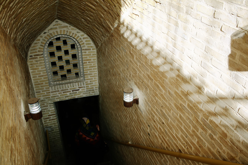 ورودی قنات دو طبقه مون در شهر اردستان- عکس از امیررضا توسلی